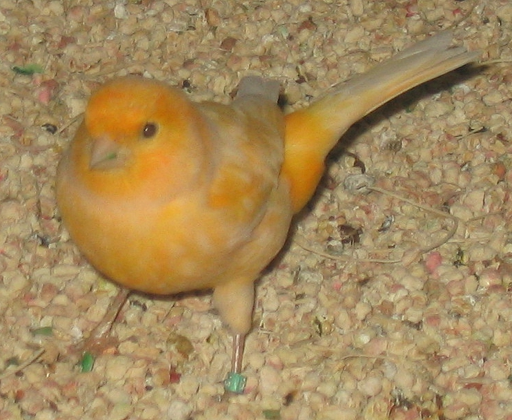 Orange Serinus hybrid.